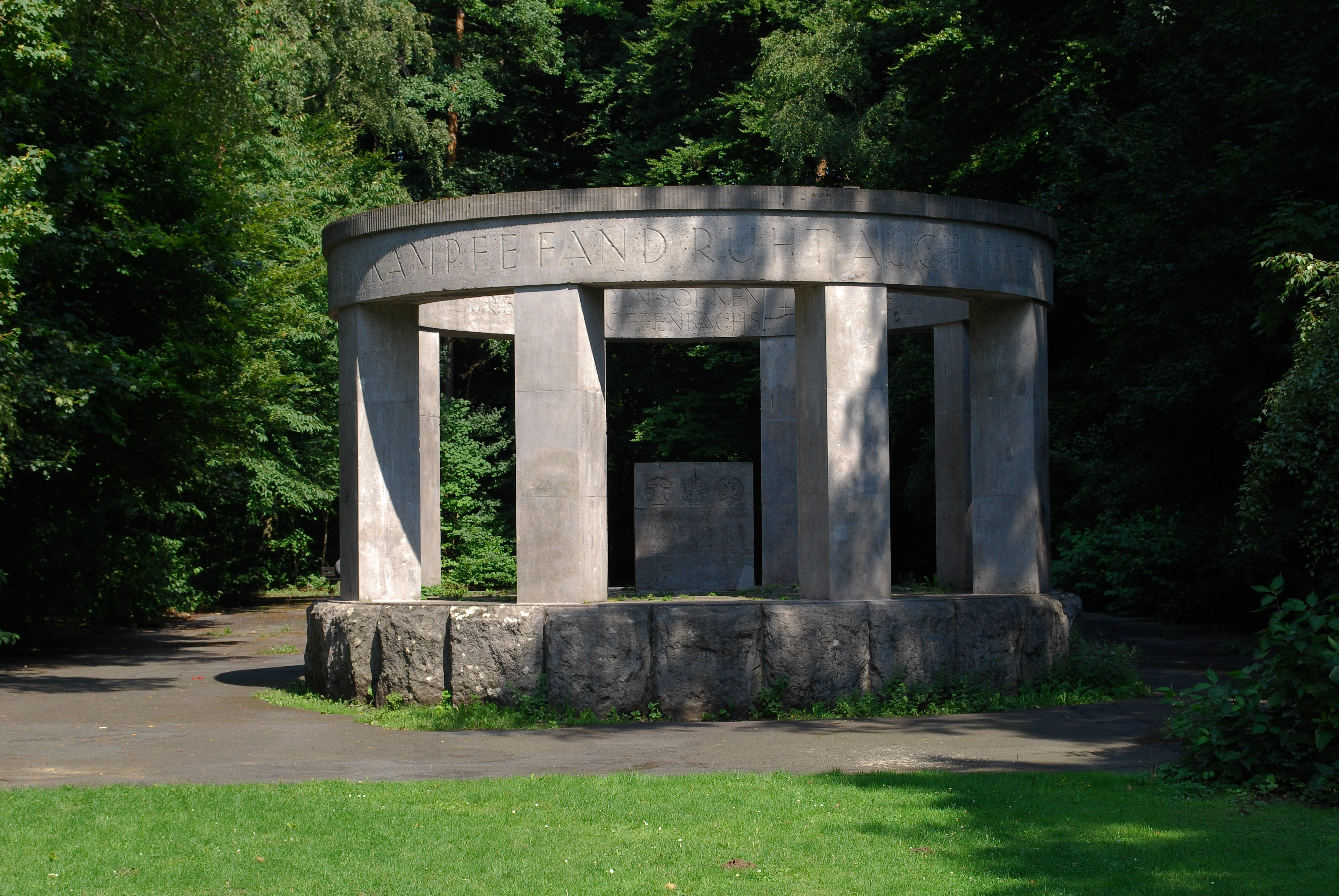 Leonhard-Eißnert-Park in Offenbach am Main - Denkmal für gefallenen Soldaten